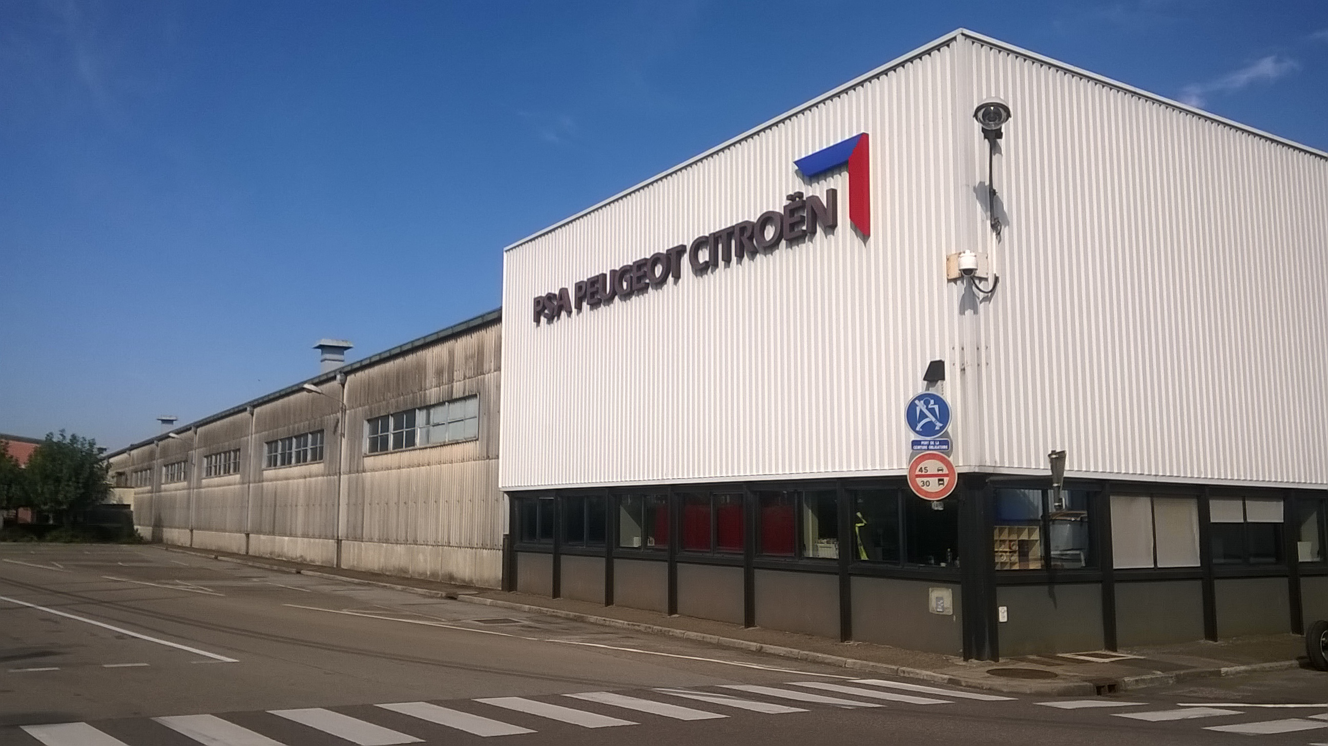 L'entrée sud de l'usine PSA de Vesoul (Haute-Saône)